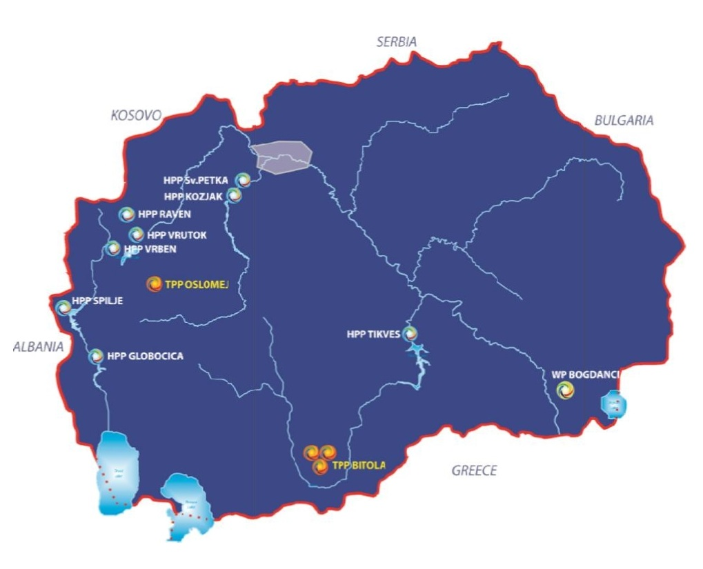 Карта на електраните на АД ЕЛЕМ